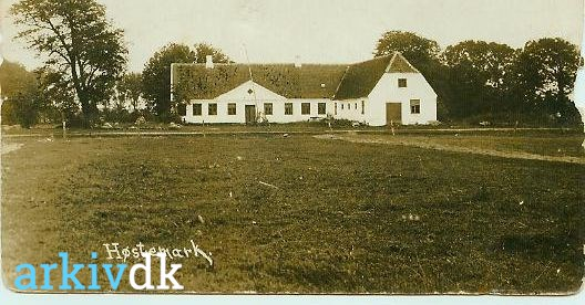 Gammel Høstemark efter den nordlige fløj er revet ned.